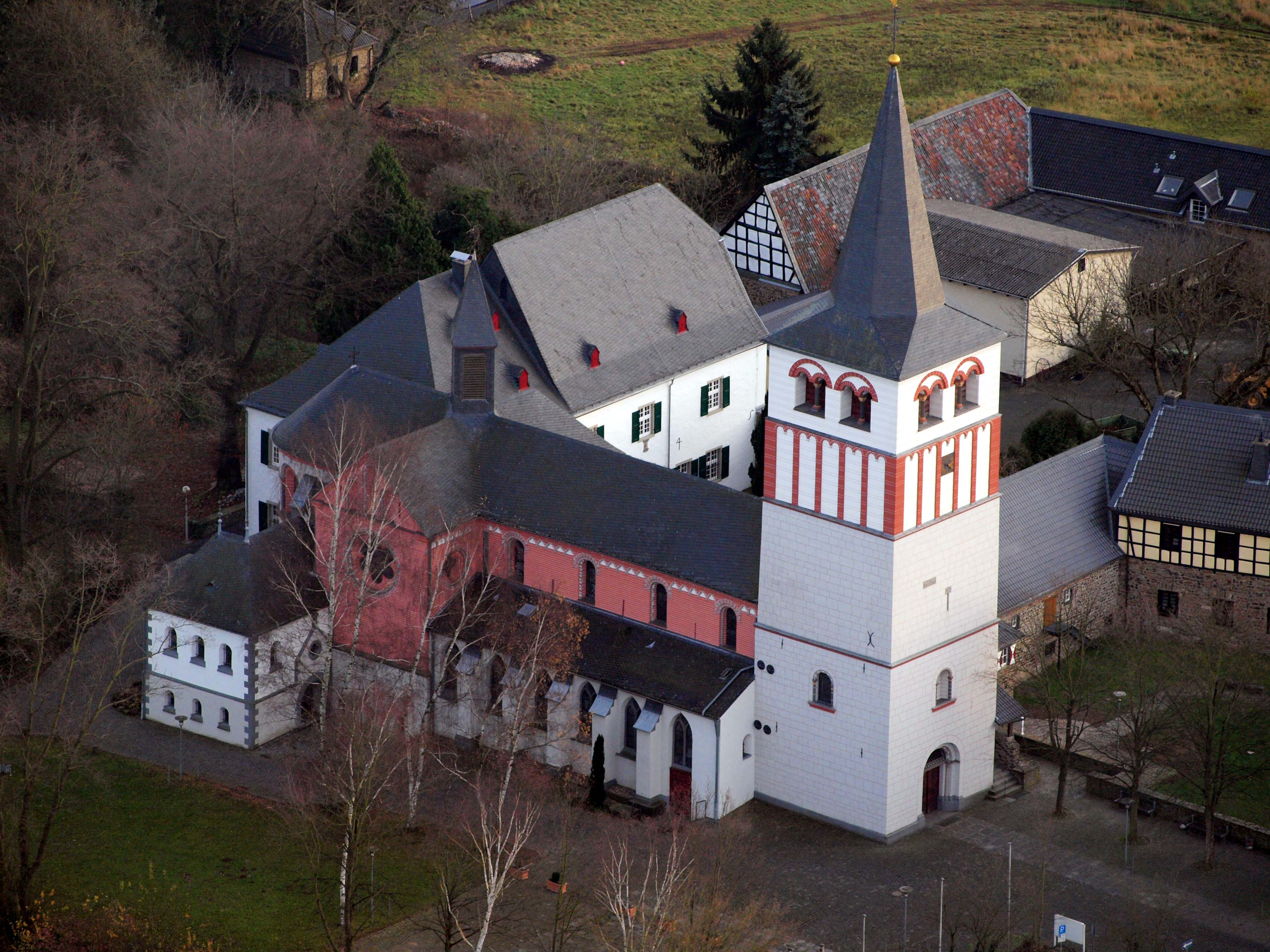 Katholische Pfarrkirche St. Pankratius und ehemalige Benediktiner-Propstei, Oberpleis: Luftaufnahme